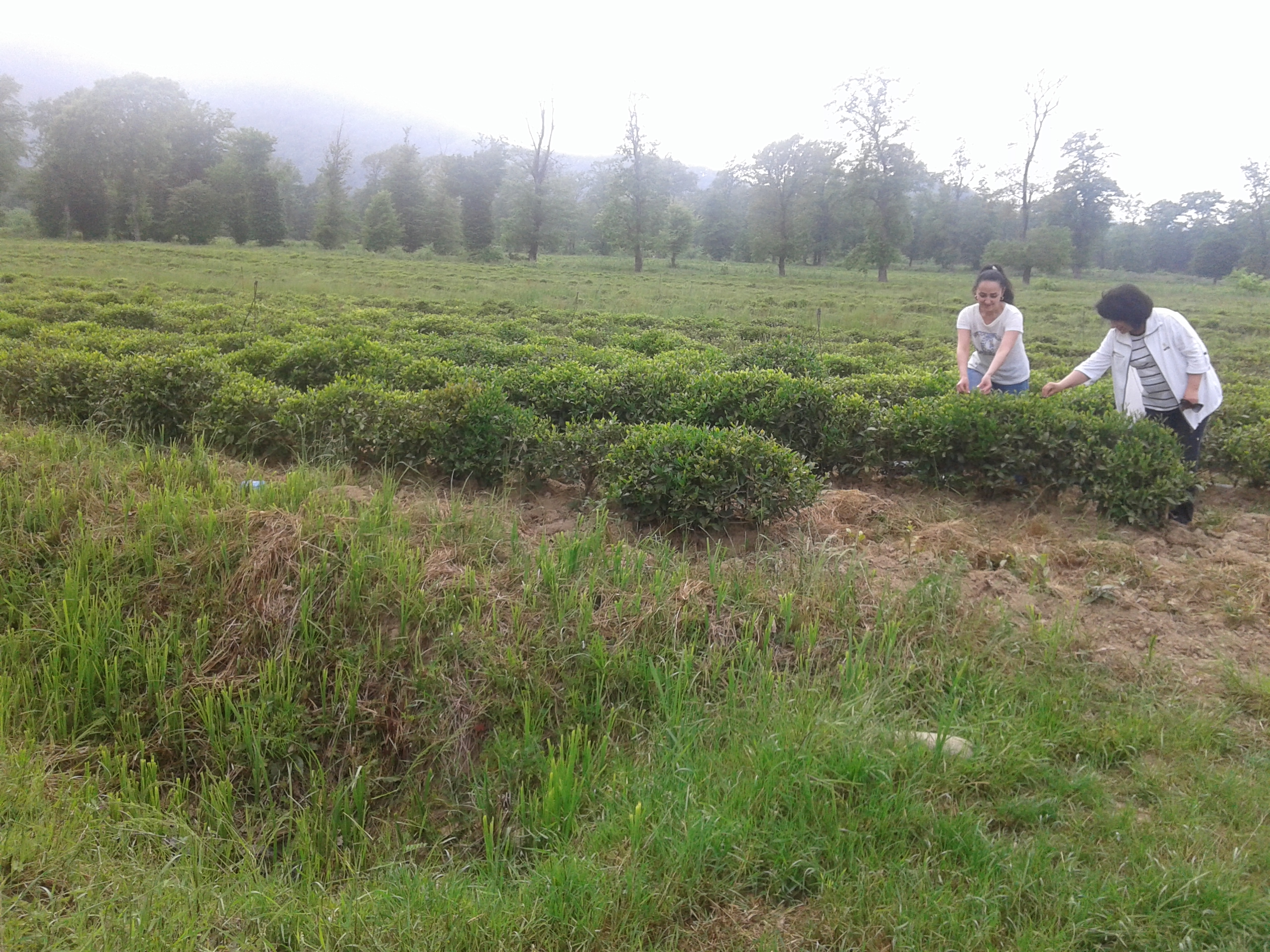 Çay kolları